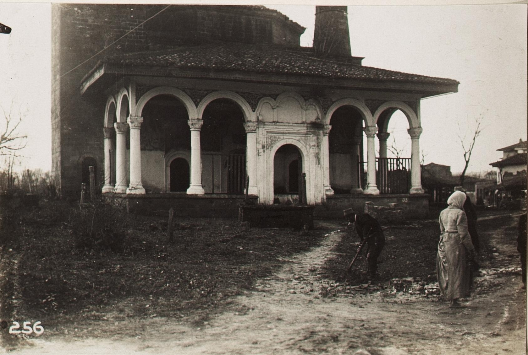 Moschee in Pekinj.